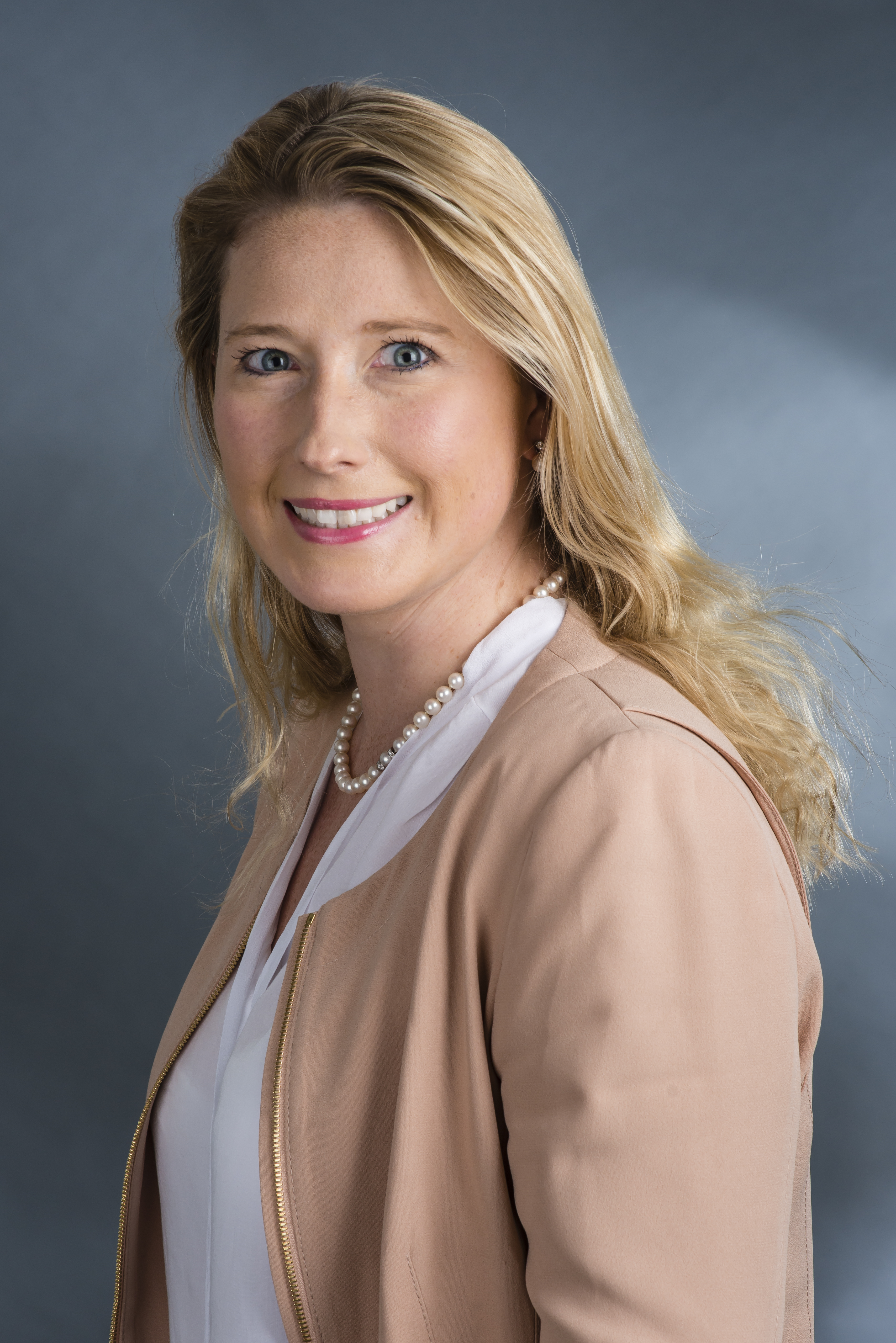 Lencke Steiner, 2015